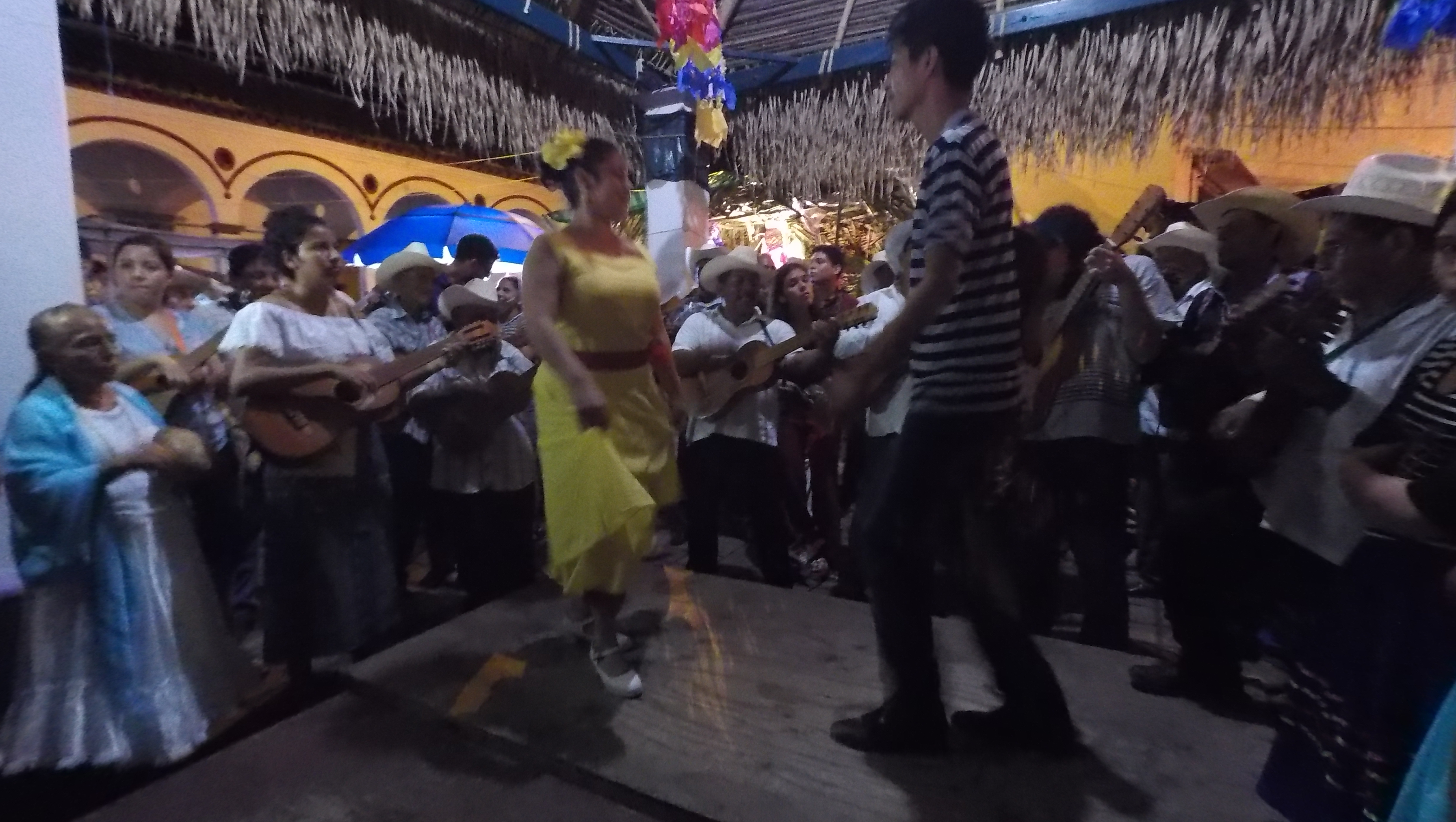 Fotografía de un fandango tradicional en Santiago Tuxtla.